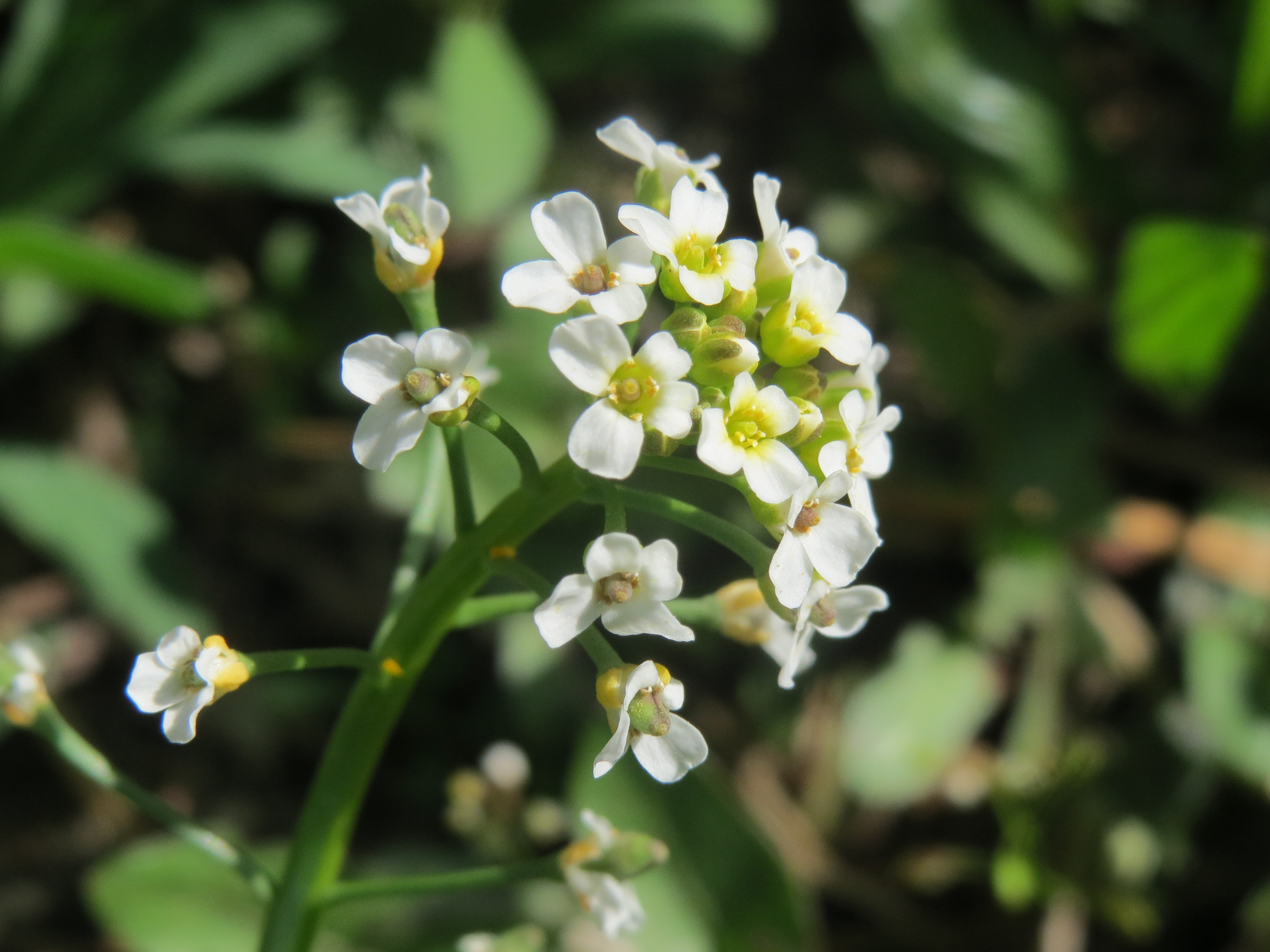 Acker-Hellerkraut (Thlaspi arvense) am Bahnhof in Hockenheim